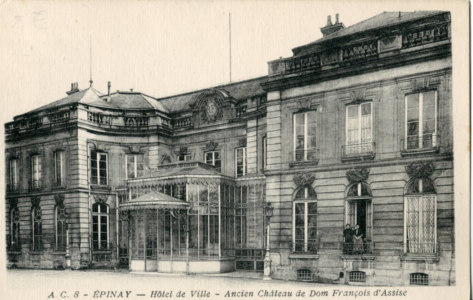 Carte postale ancienne éditée par Abeille N°AC8 ÉPINAY-SUR-SEINE : Hôtel de Ville - Ancien château de Dom François d'Assise